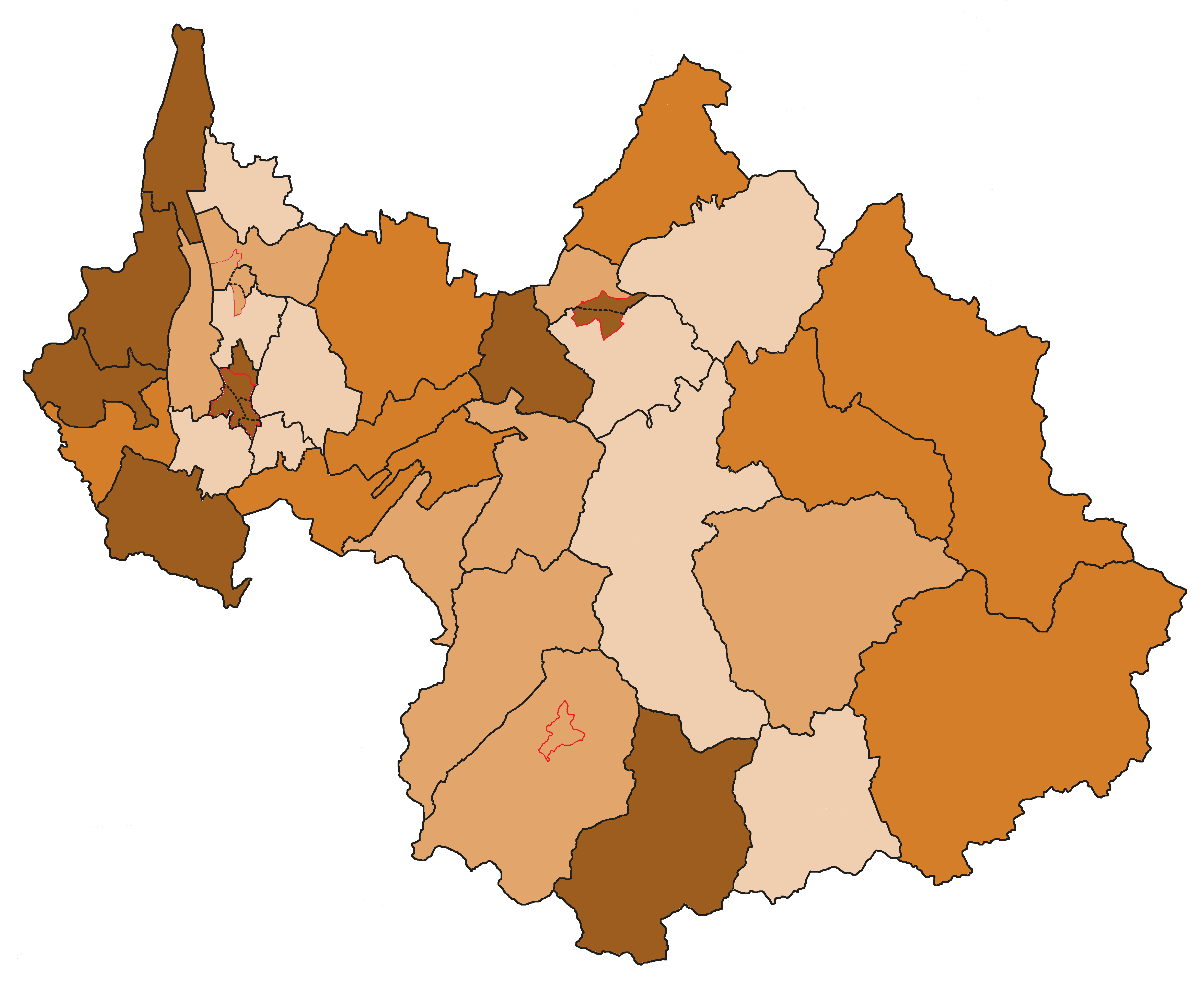 English (en): Map of the French department of Savoie. Are here shown the population birth rates by commune (excepts cities of Chambéry, Aix-les-Bains and Albertville) from the 2011 figures of Insee. To 10,7 births per 1 000 inhabitants To 11,6 births per 1 000 inhabitants To 13,0 births per 1 000 inhabitants More than 13,0 births per 1 000 inhabitants français (fr): Carte du département français de la Savoie. Sont ici indiqués les taux de natalité par cantons (sauf communes de Chambéry, Aix-les-Bains et Albertville) d'après les chiffres 2011 de l'Insee. Jusqu'à 10,7 naissances pour 1 000 habitants Jusqu'à 11,6 naissances pour 1 000 habitants Jusqu'à 13,0 naissances pour 1 000 habitants Plus de 13,0 naissances pour 1 000 habitants